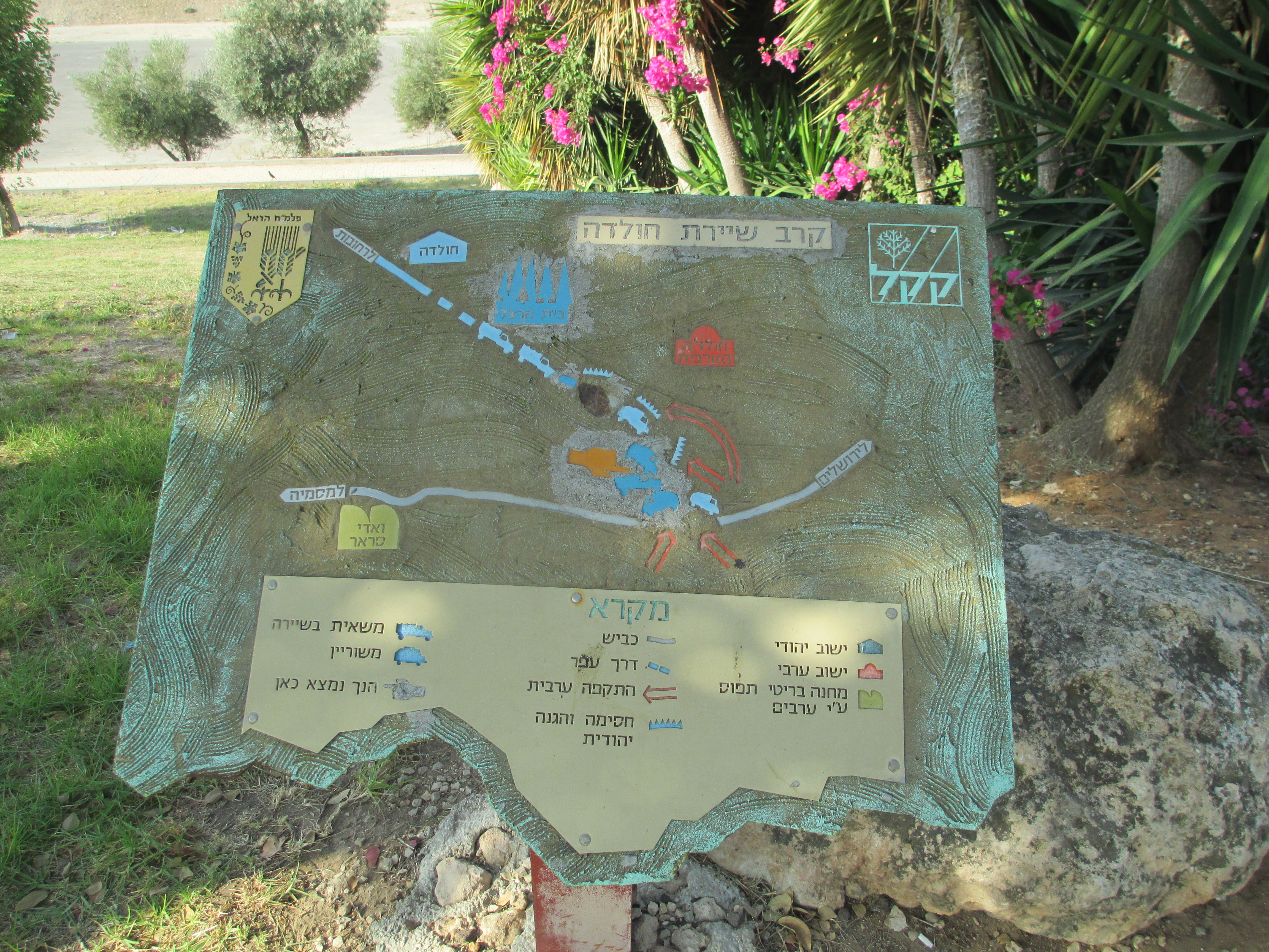 תרשים קרב שיירת חולדה באנדרטת חיל ההנדסה ליד צומת חולדה